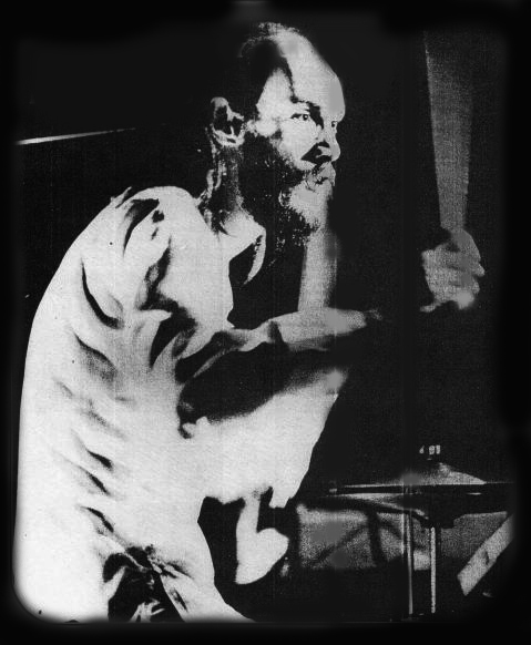 Gonzalo Farrugia. Foto del reportaje en la Revista Mordisco, Mayo 1977.